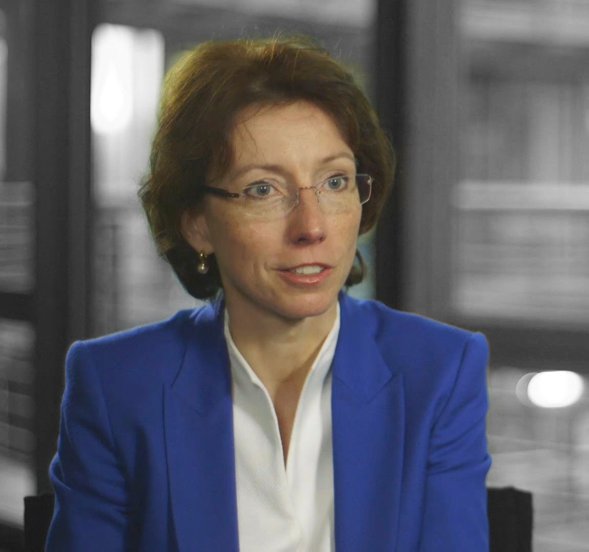 Ohne Datenschutz keine Freiheit? Bei der Digitalisierung dürfe man nicht alles den Unternehmen überlassen, warnt Indra Spiecker gen. Döhmann, Professorin ...